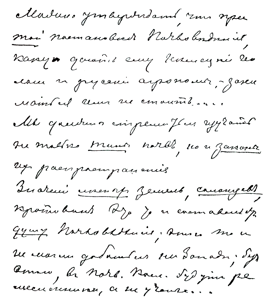 Рукопись В. В. Докучаева.